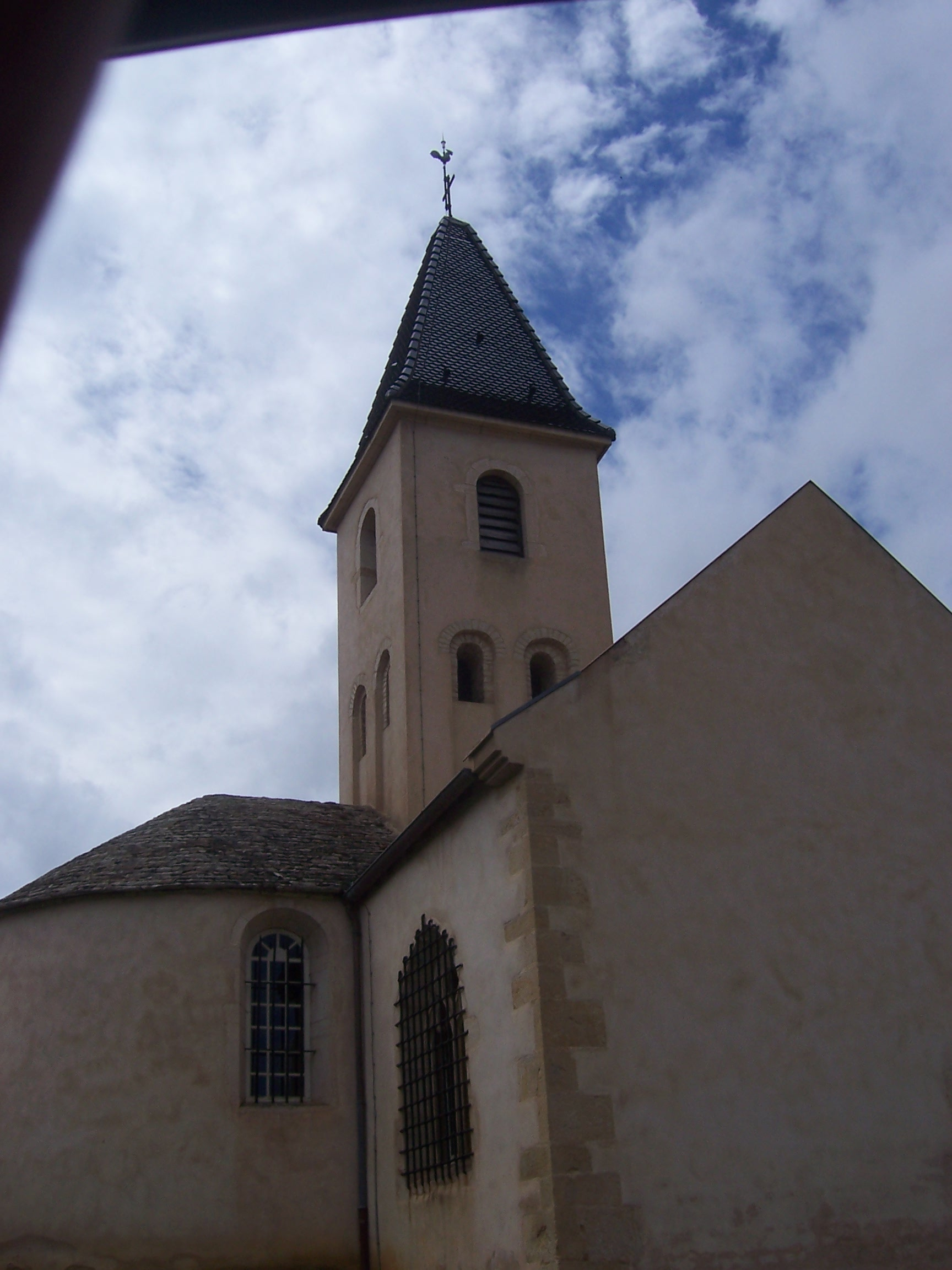 Eglise de Cruzille